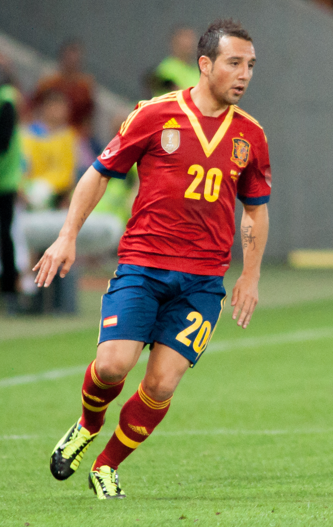 Espagne - Chili, 10 septembre 2013.